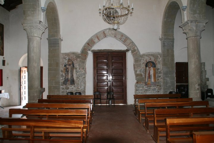 Affreschi Bizantini